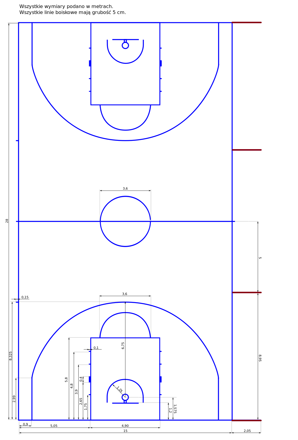 boisko do koszykówki